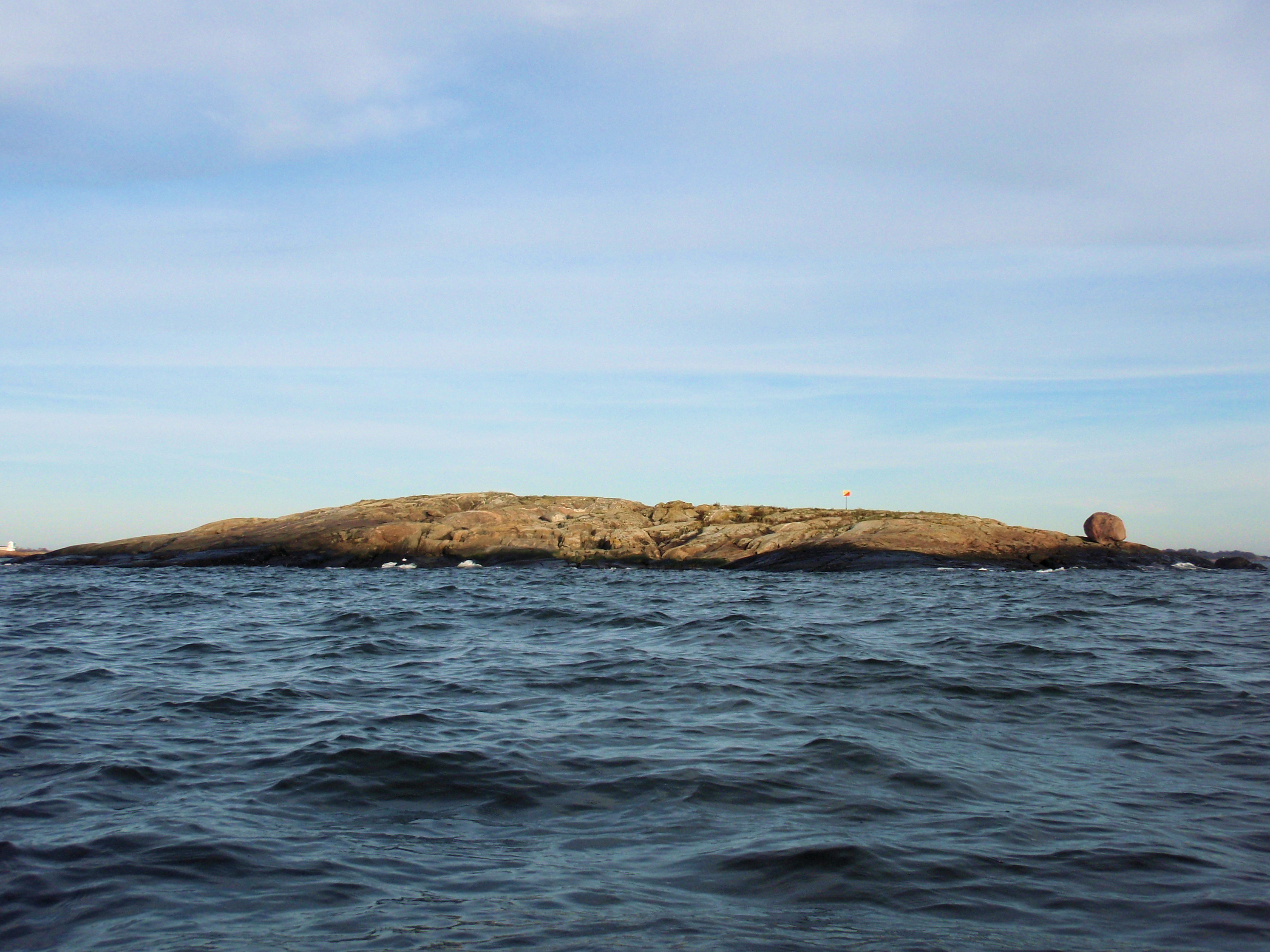 Koirapaasi-niminen saari Helsingin vesillä